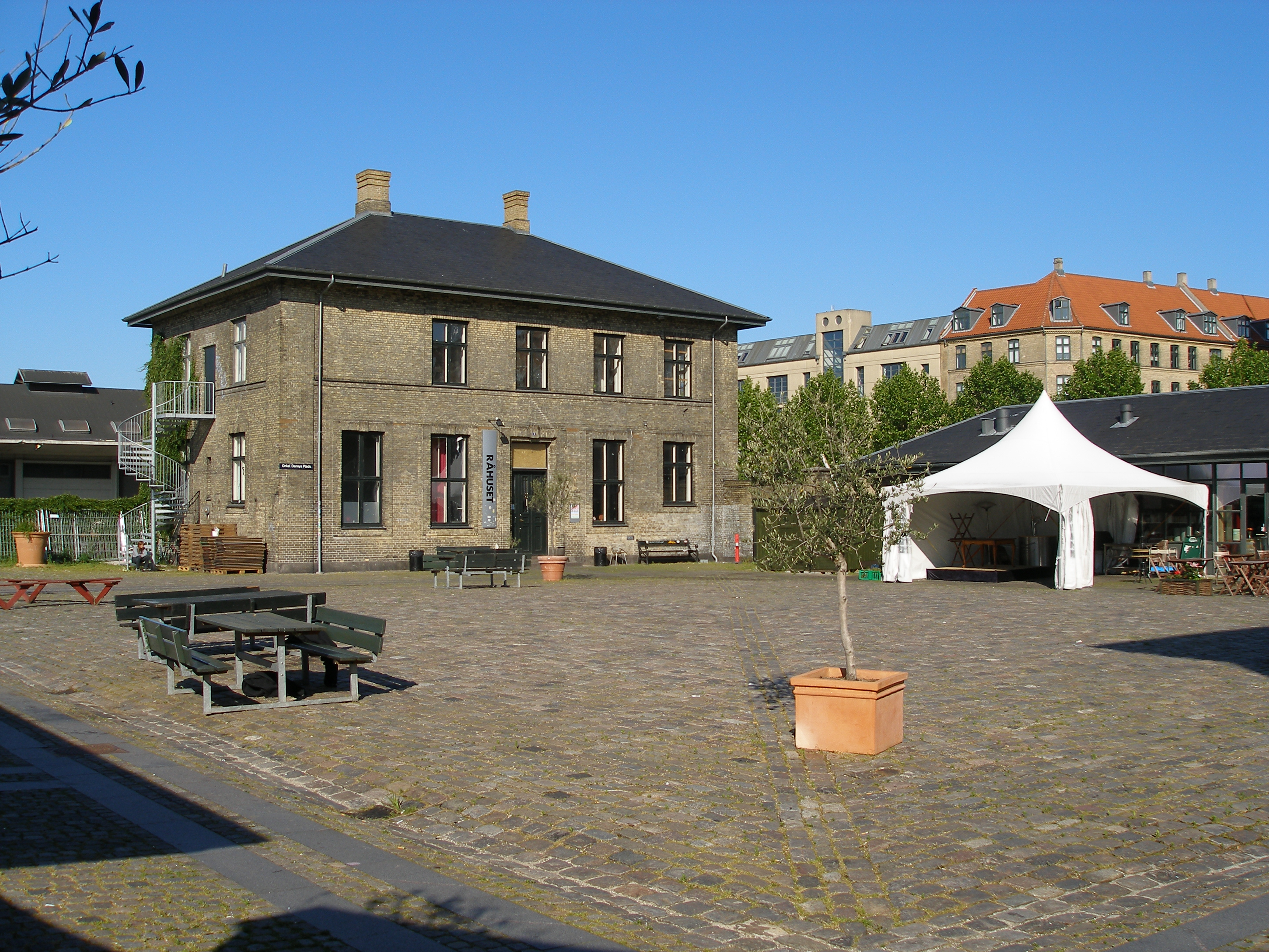 Onkel Dannys Plads, Kødbyen, København